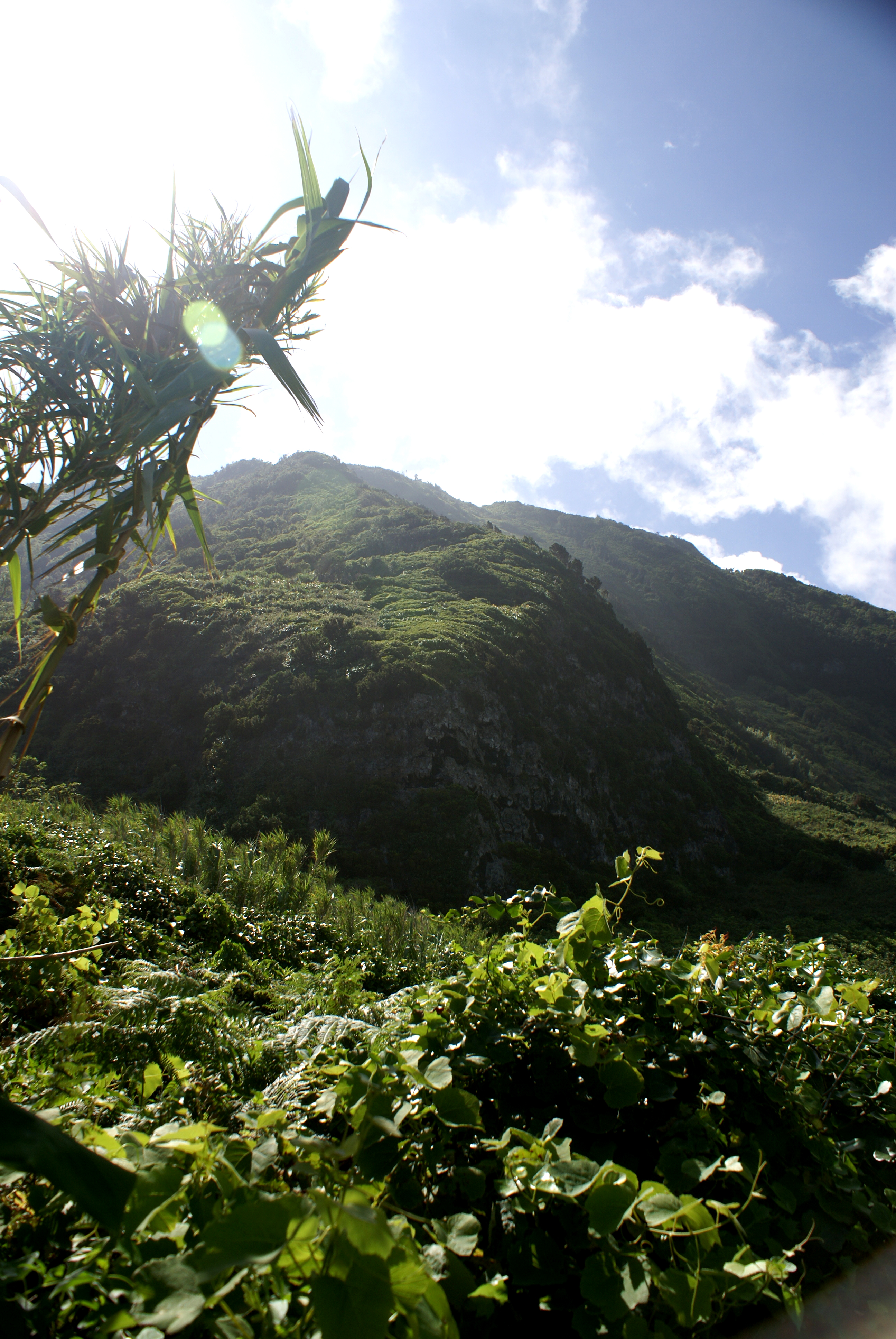 Fajã Rasa caminho entre esta fajã e a Fajã de Vasco Marins, Toledo, Velas, ilha de São Jorge, Açores